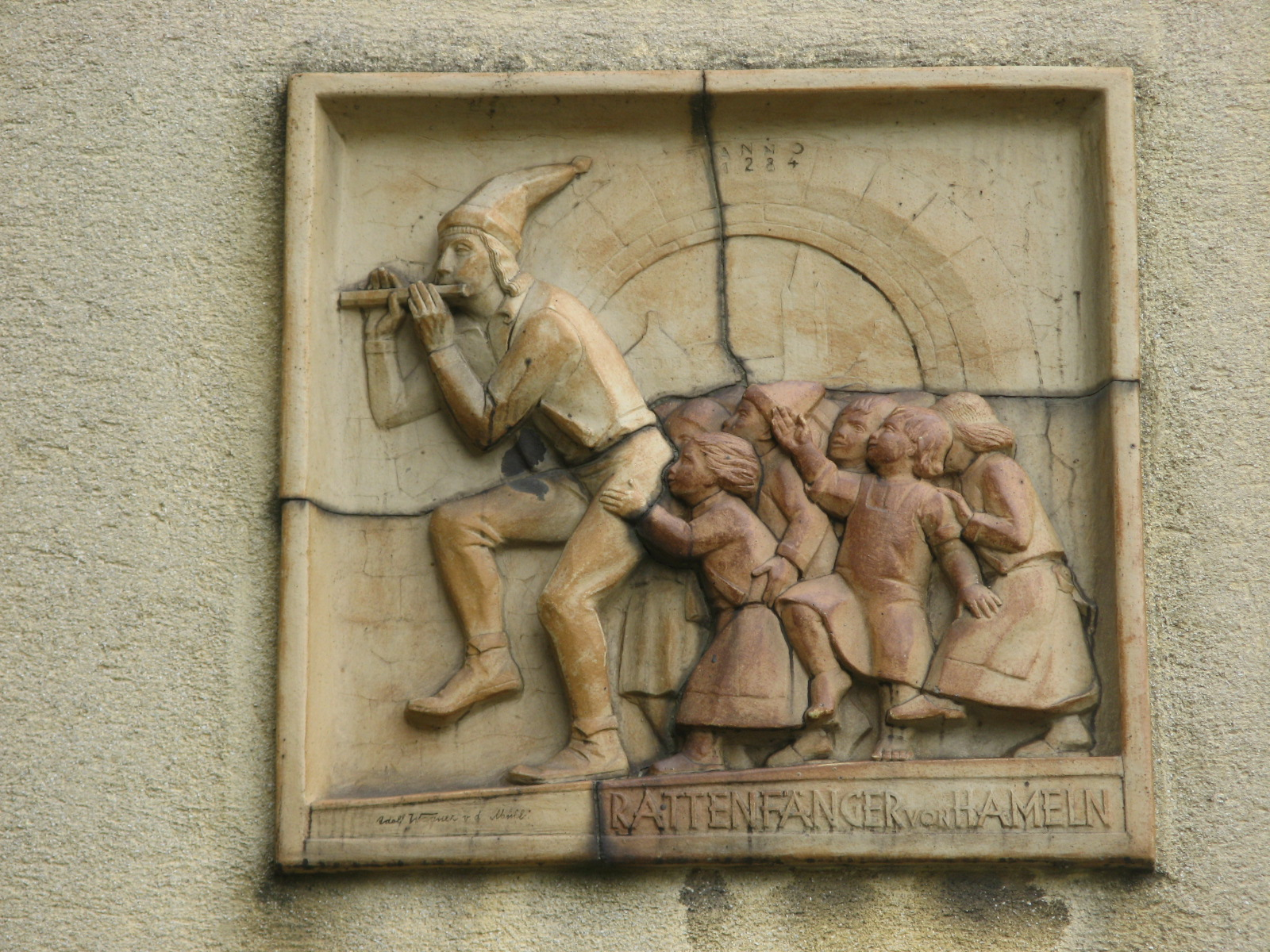 Der Rattenfänger von Hameln, Johann-Mithlinger-Siedlung, Raxstraße 7-27, Wien-Favoriten